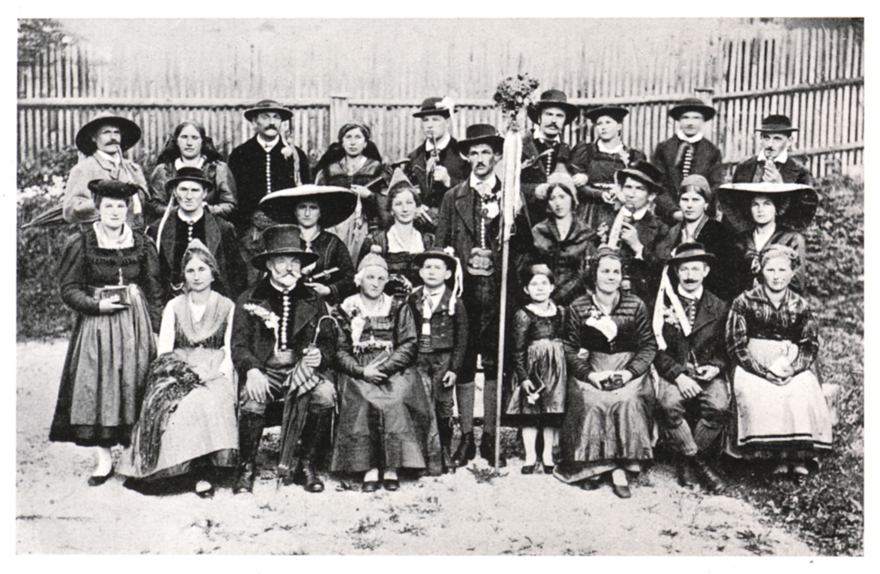 Steirisches Trachtenbuch - Mautner-Geramb 1935 Traditional Costumes from Ennstal, Styria